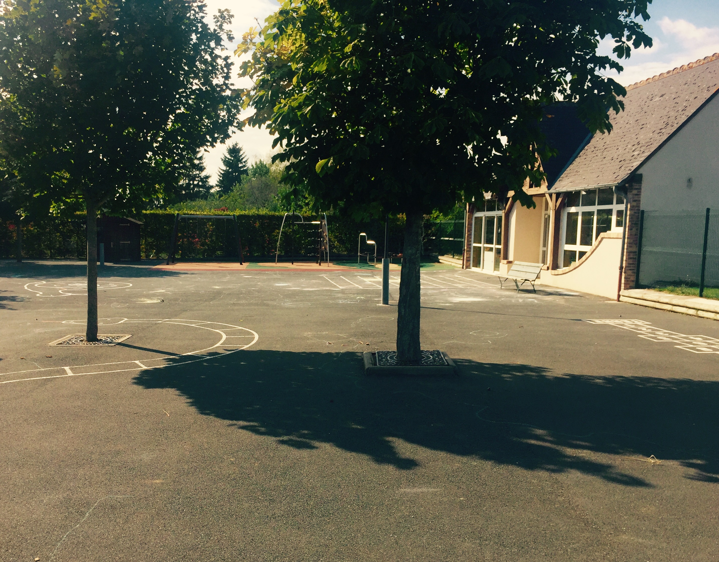 Cours de l'école de Montreuil-en-Touraine. En 2016, l'école comprend une école maternelle et une école primaire limitée au CP. Les autres classes du primaire sont effectuées dans des villages environnants dans le cadre d'un regroupement pédagogique.